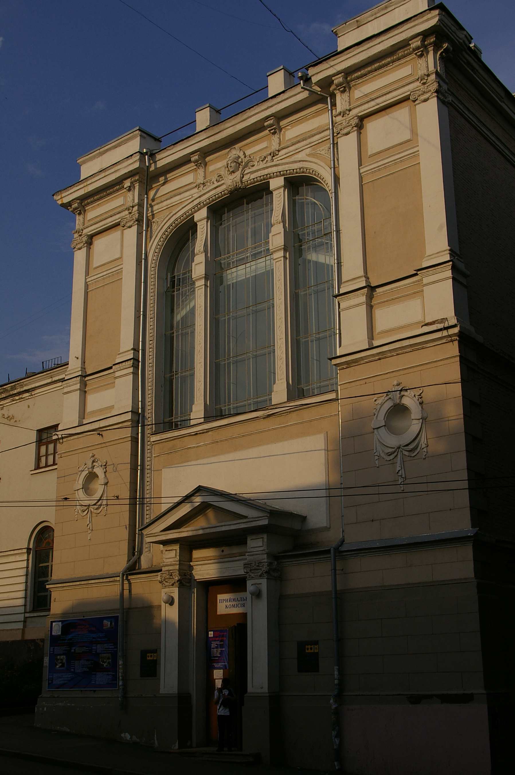 Харьков